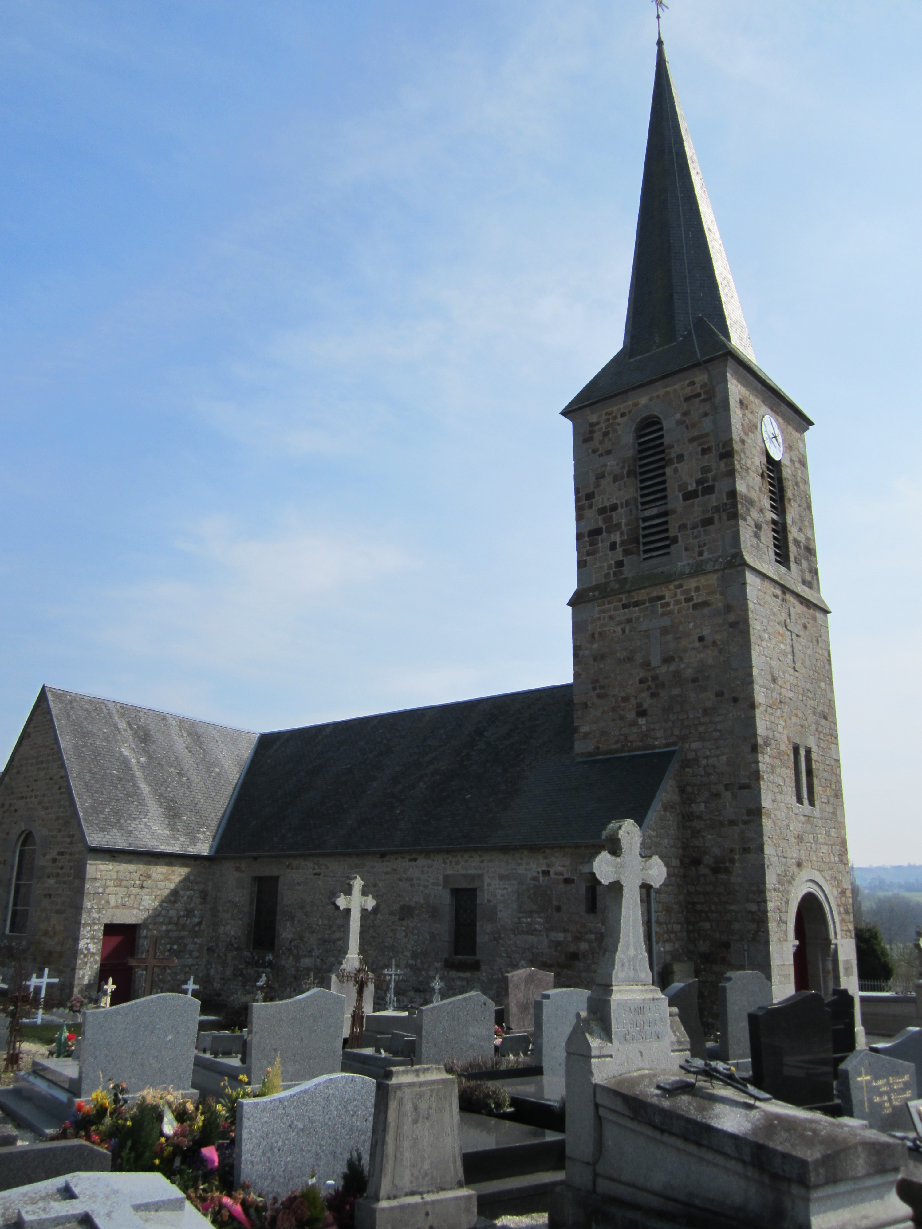 Église Notre-Dame-de-l'Assomption, Le Mesnil-Gilbert